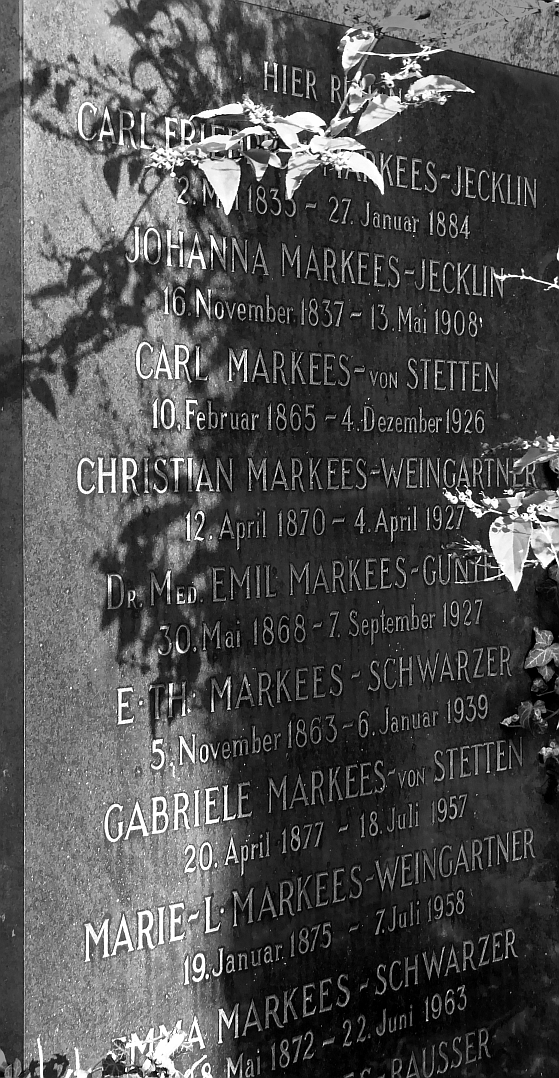 Carl Markees-von Stetten (1865–1926), Geiger, Komponist, Musikpädagoge, Grab auf dem Friedhof Wolfgottesacker, Basel